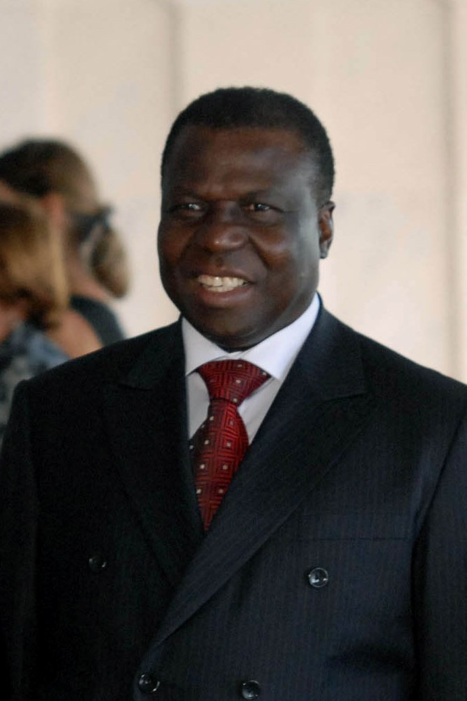 João Bernardo Vieira, president of Guinea-Bissau, during his visit to Brasil